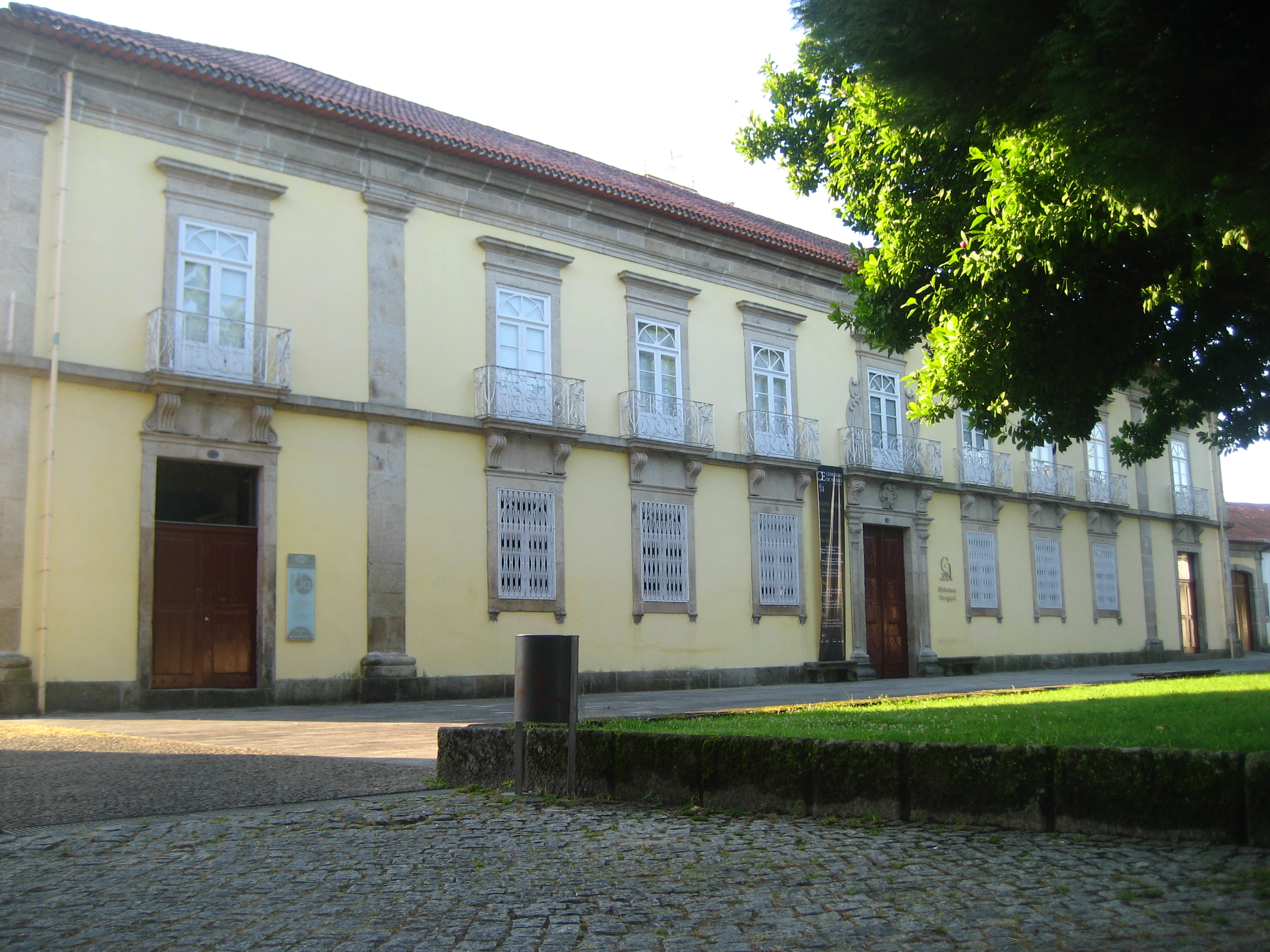 Bibliothèque, Arcos de Valdevez, Portugal